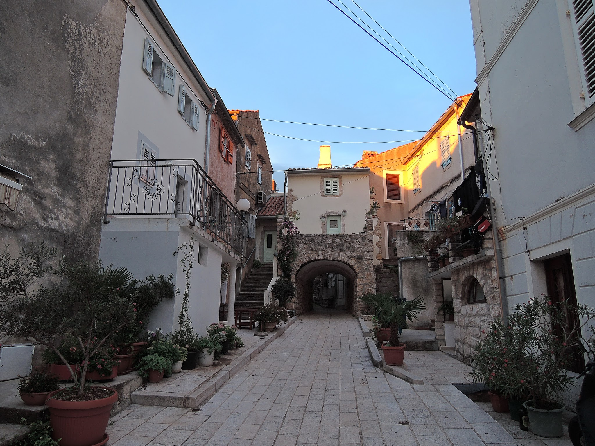 51513, Omišalj, Croatia